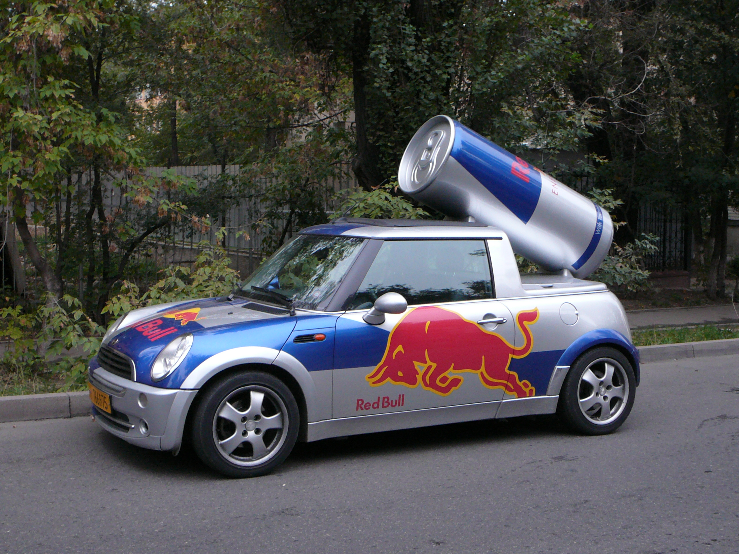 Рекламный Мини Купер-пикап. Алма-Ата